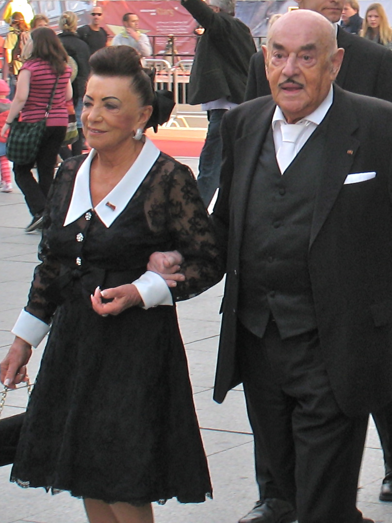 Maria und Artur Brauner in Berlin bei der Eröffnung von Boulevard der Stars